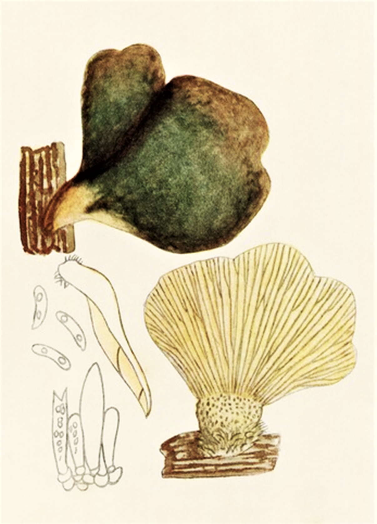 Bres.: Pleurotus serotinus (Pers., 1793) P.Kumm., heute (Pers., 1793) Kühner (1950)